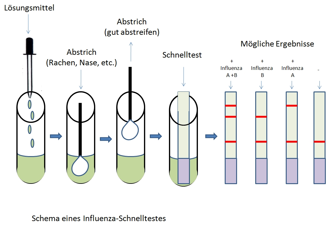 Generelles Schema eines Influenza-Schnelltestes